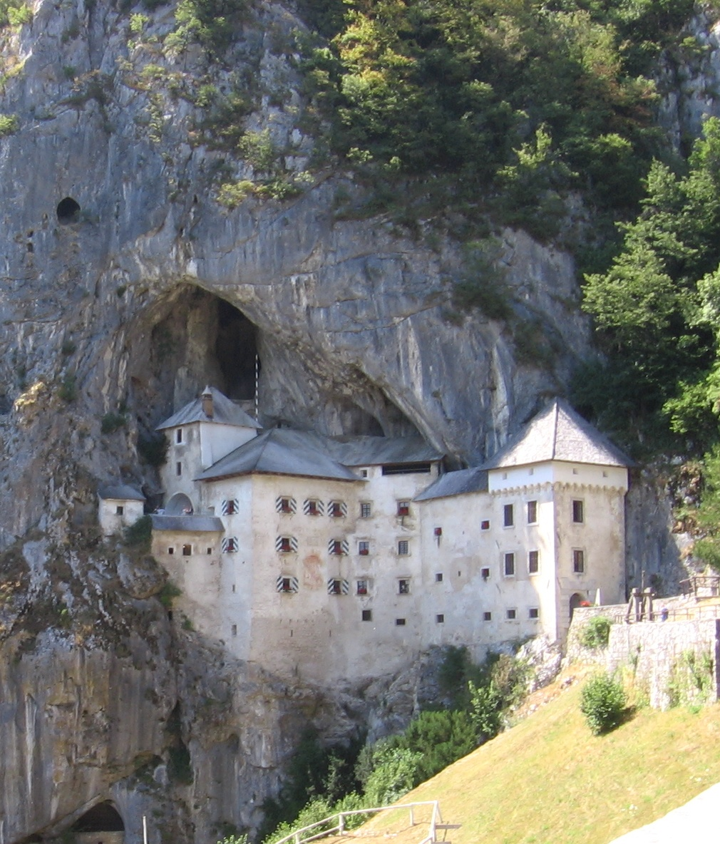 Predjama Castle, Slovenia